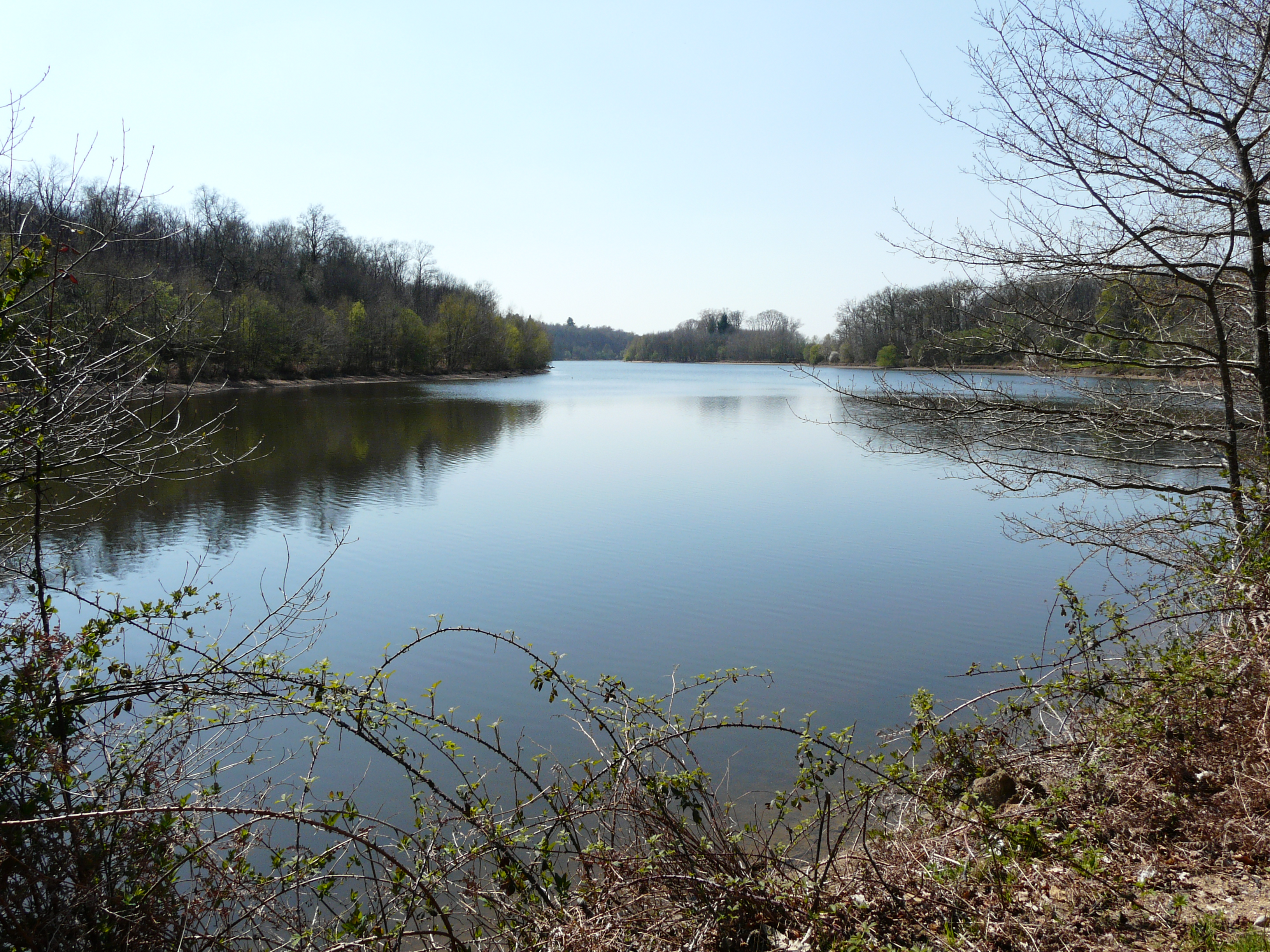 À son extrémité orientale, le plan d'eau de Miallet marque la limite entre La Coquille (rive sud, à gauche) et Mialet (rive nord, à droite), Dordogne, France.